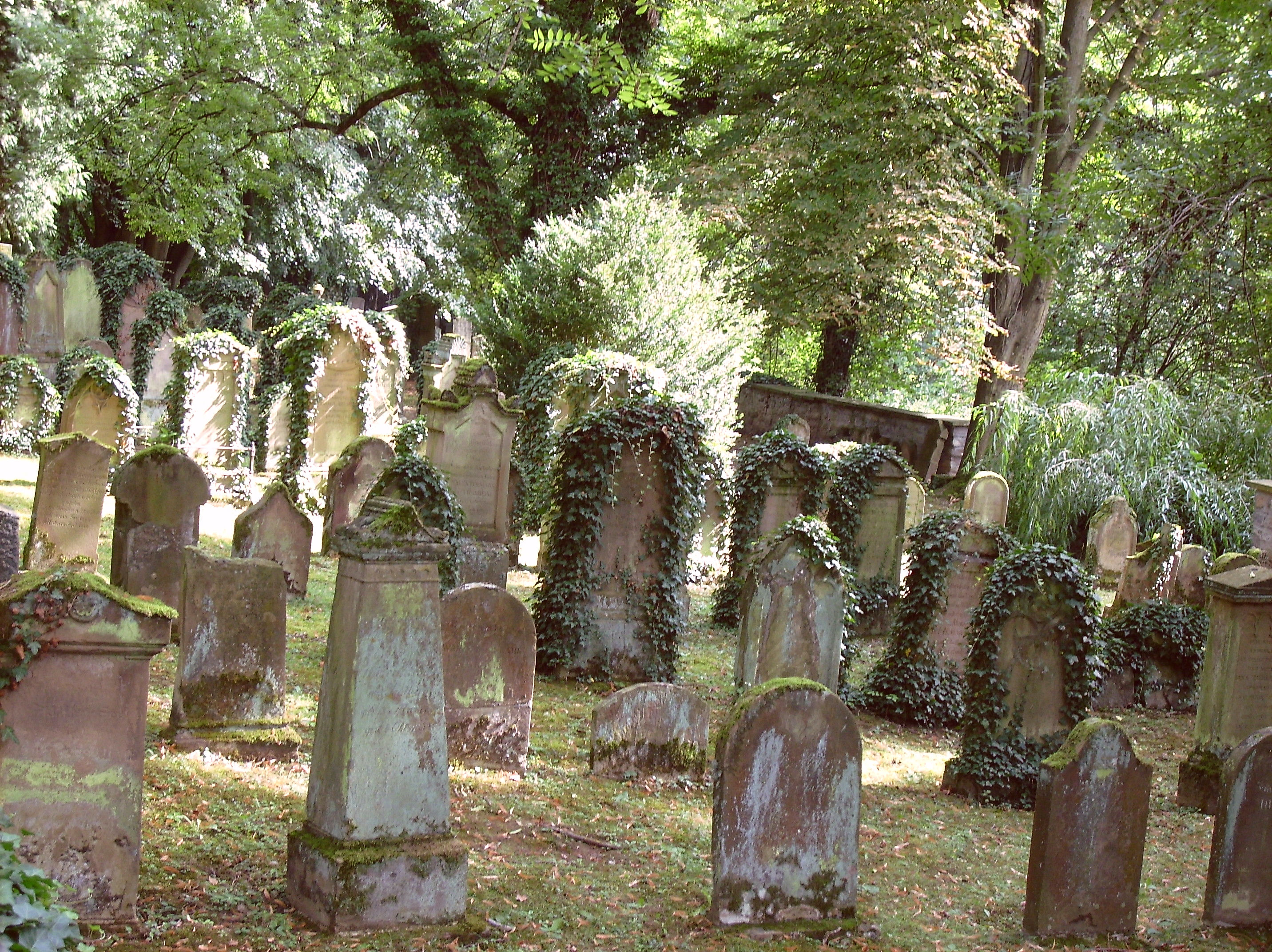 Der Jüdische Friedhof Sontheim, gelegen zwischen Heilbronn-Horkheim und Talheim an der Schozach.